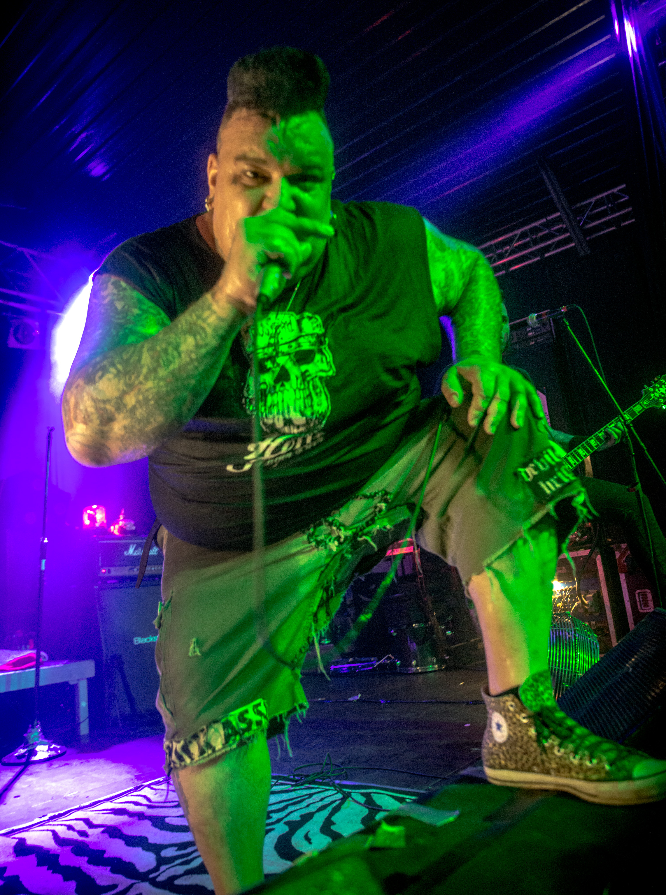 de